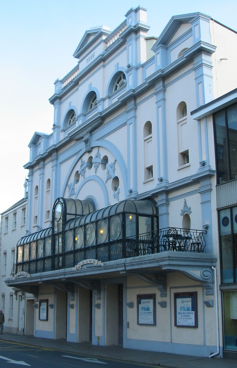 Opera House, Saint Helier, Jersey